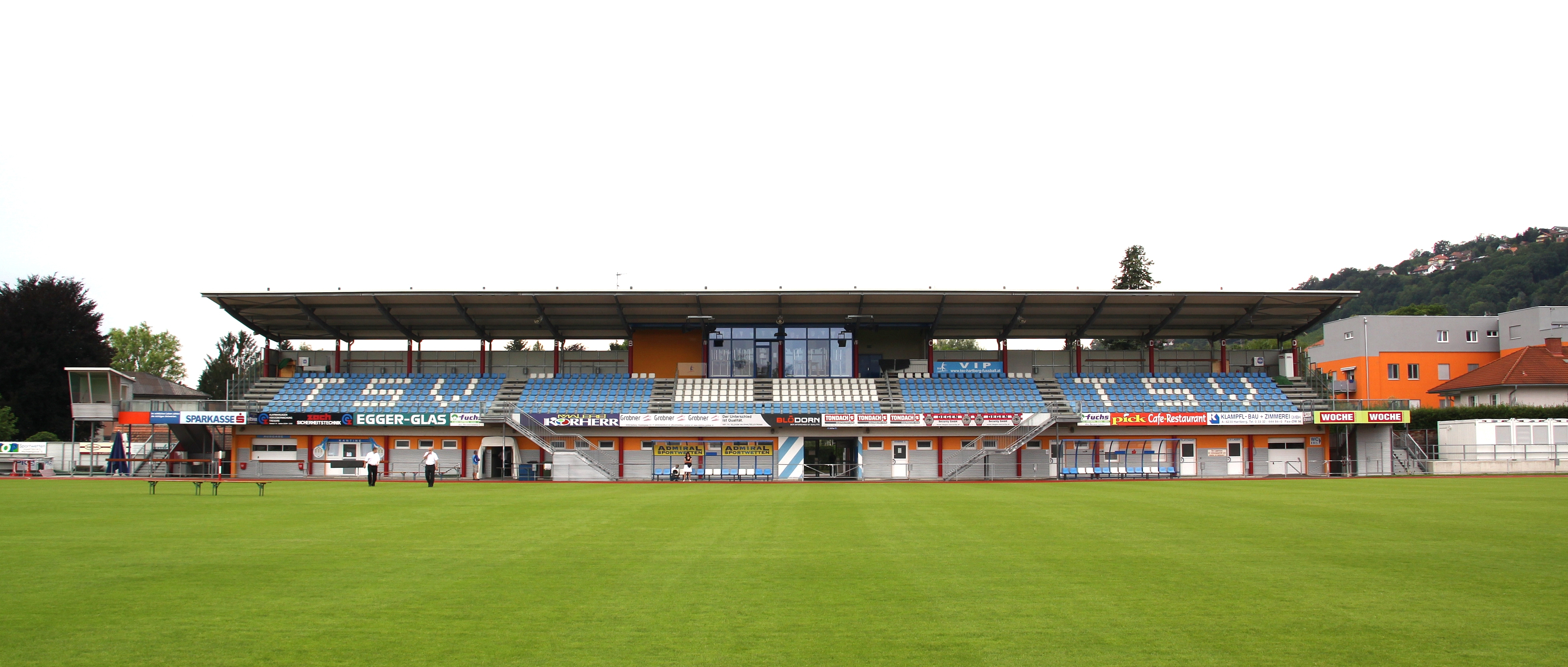 Stadion Hartberg, Haupttribüne – Heimstätte des TSV Hartberg (österreichische Erste Liga)